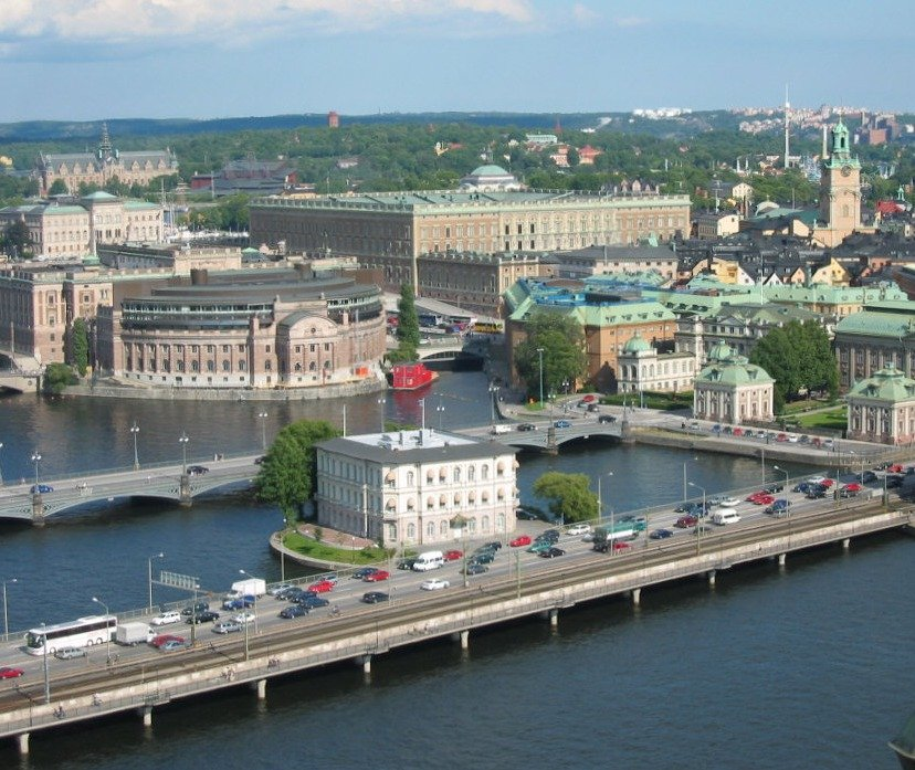 Detail of Image:Stockholm.jpg.